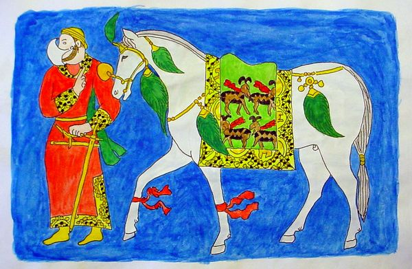 Freskórészlet Afrasziabból, Üzbegisztánból